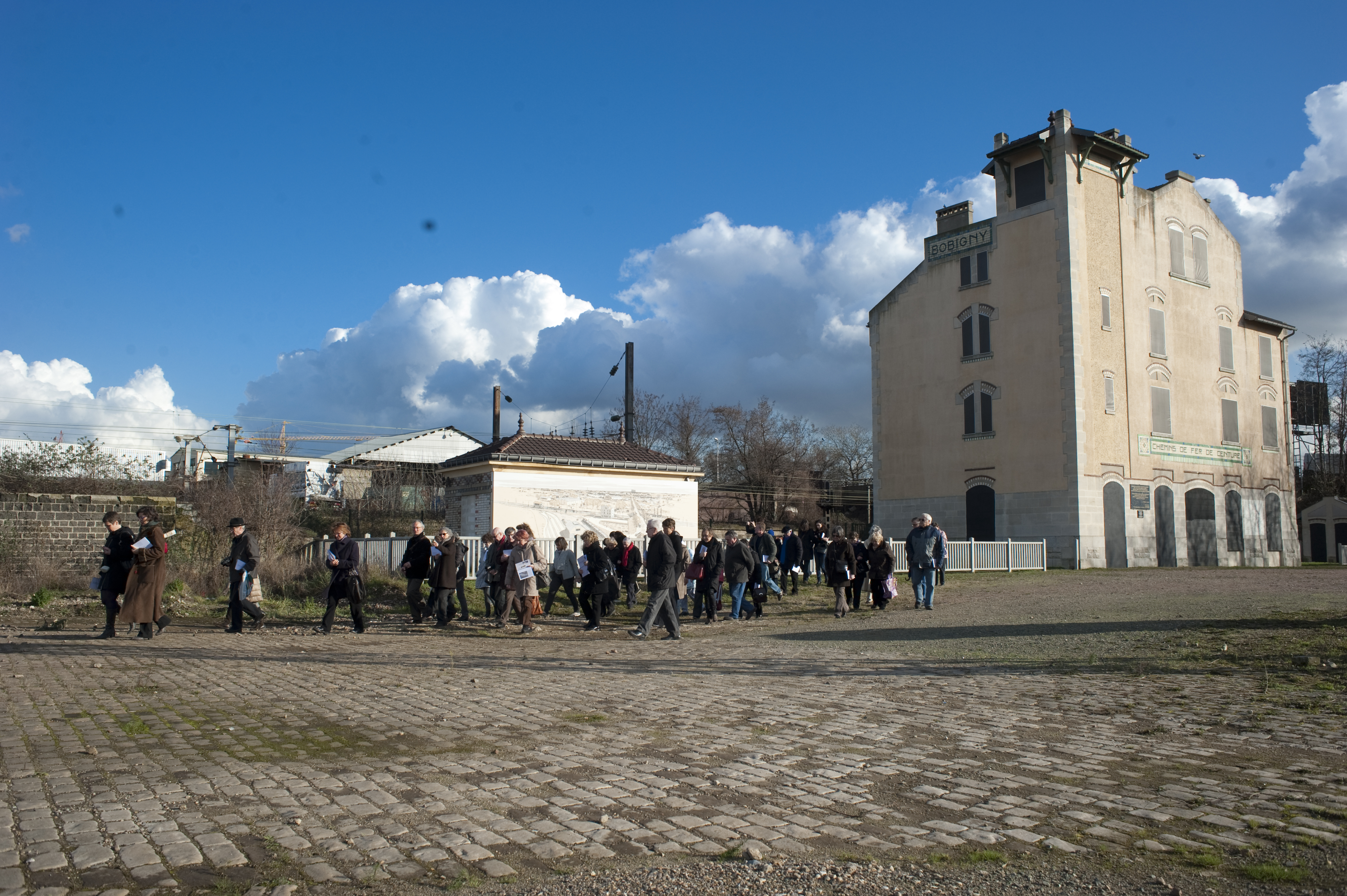 Ancienne gare de déportation en 2012 - Bâtiments des voyageurs et lampistes